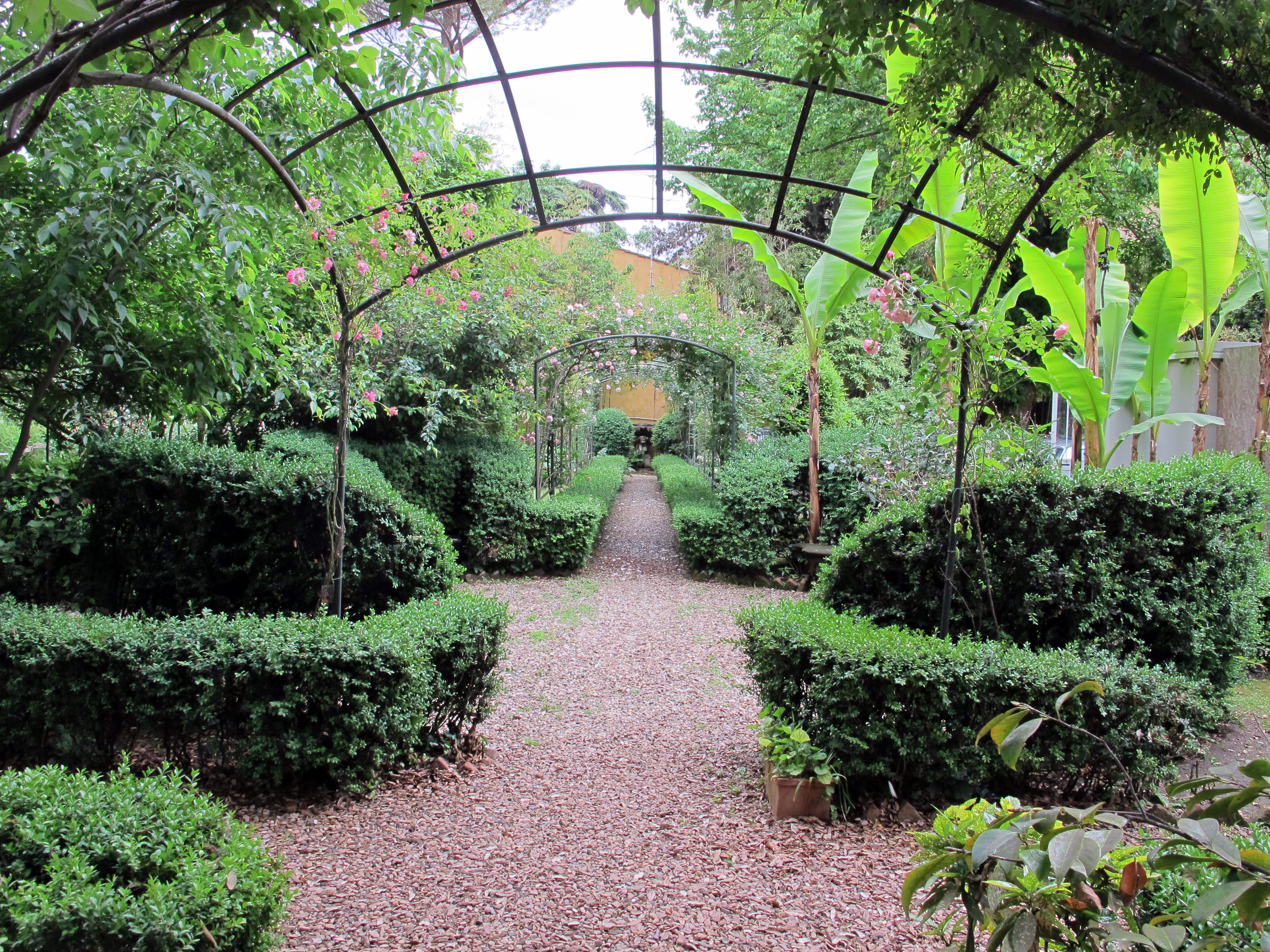 Khi florenz, giardino